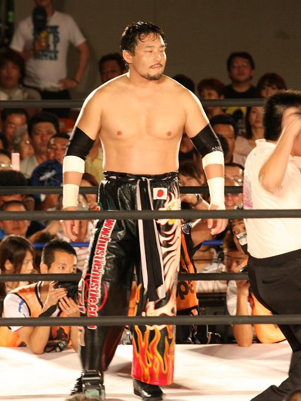 Tajiri